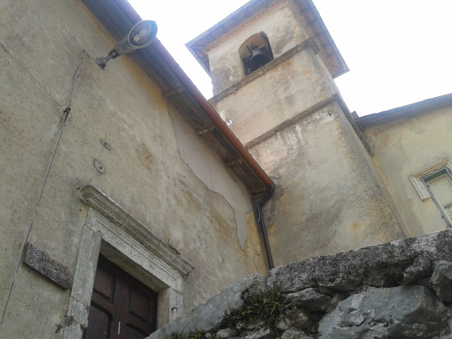 Chiesa di Santa Maria degli Angeli